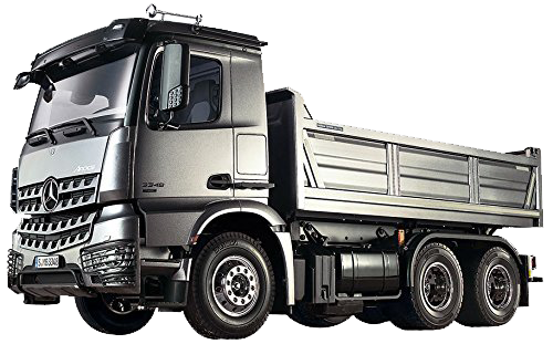 Reproduction du camion benne Tamiya